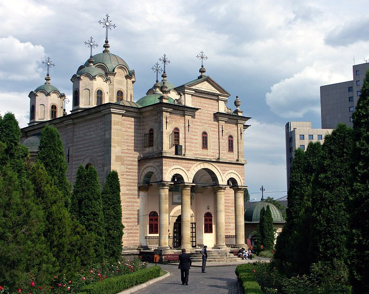 Biserica_Barboi